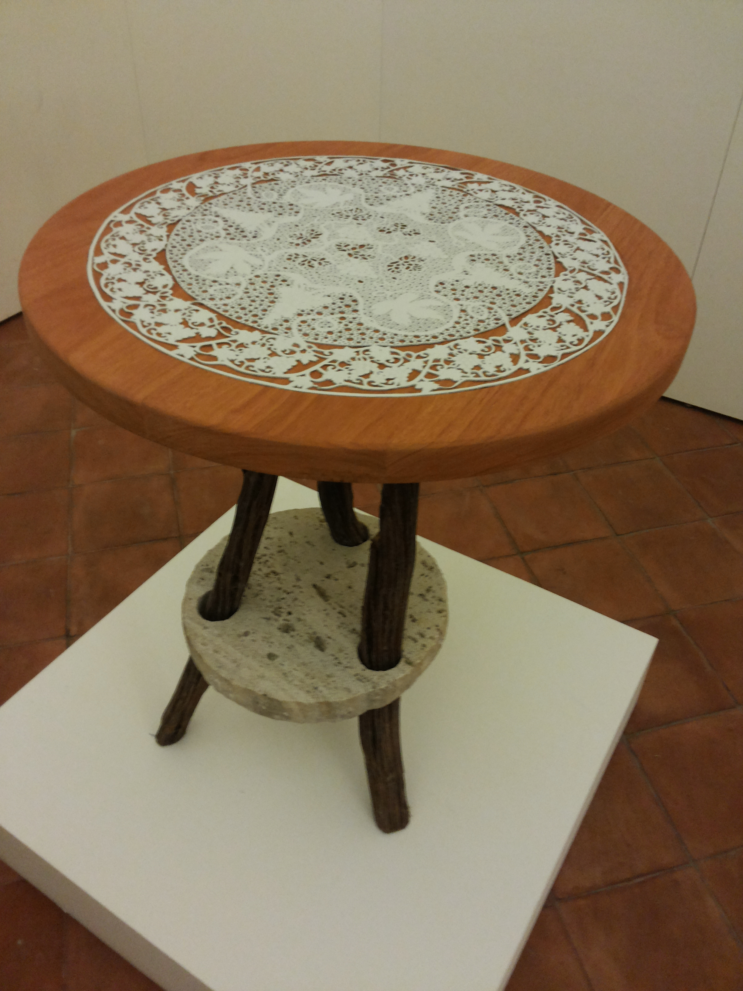 Mostra Ottocelle/Fabbrica al Museo d'Arte Contemporanea di Alcamo